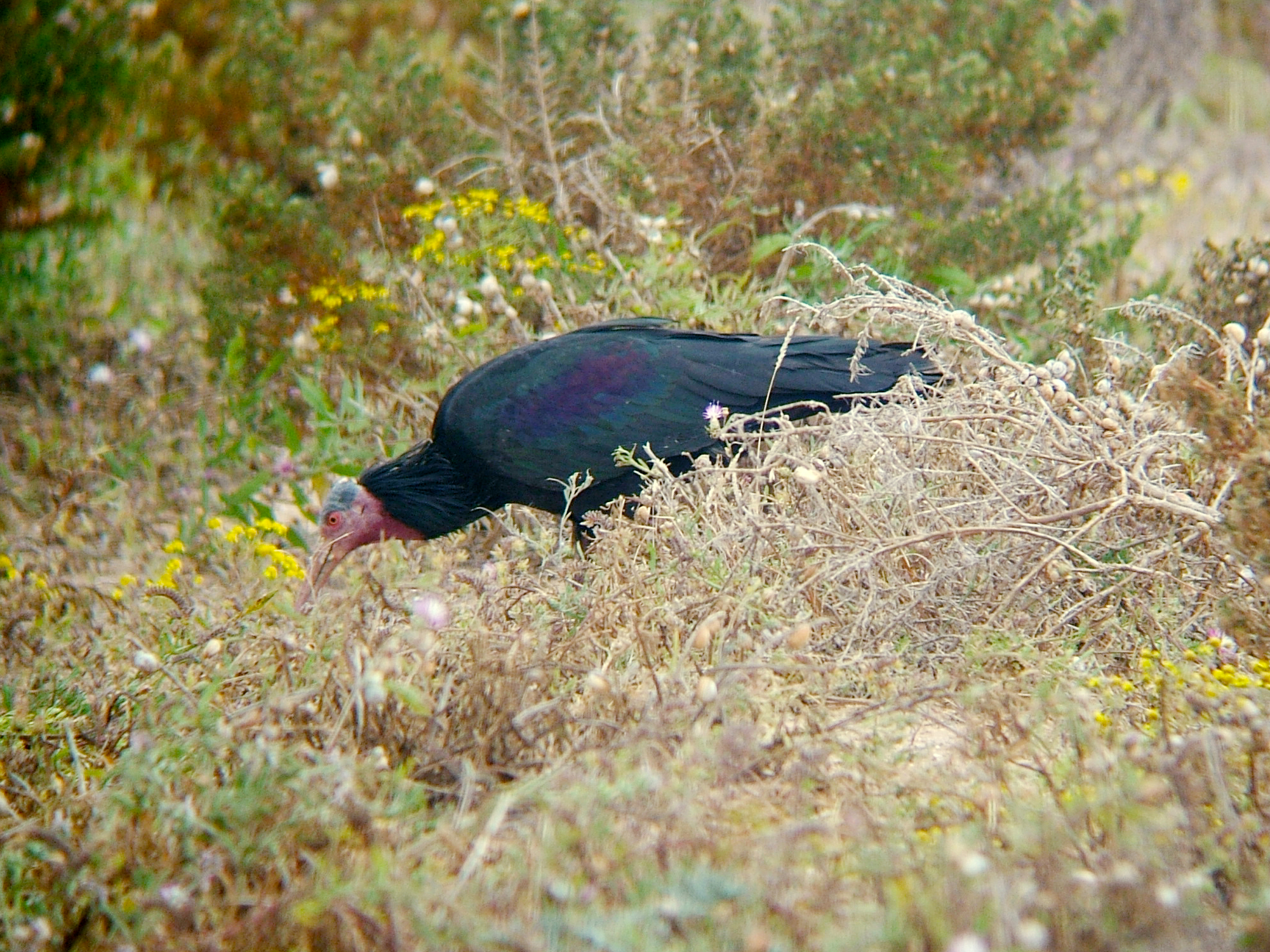 Geronticus eremita, near Tamri, Morocco, 17 April 2006